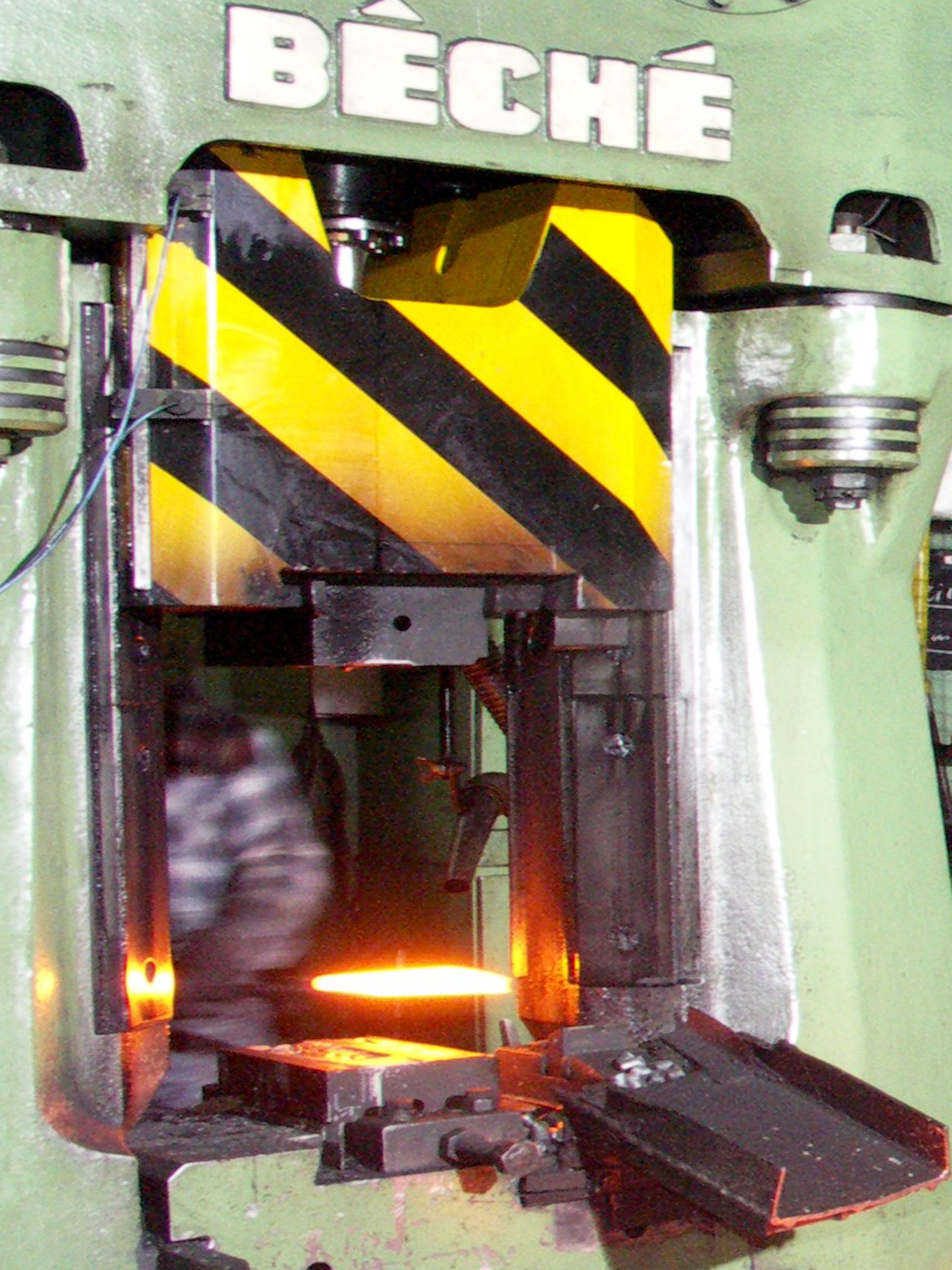 Schmiedeteil Hammer